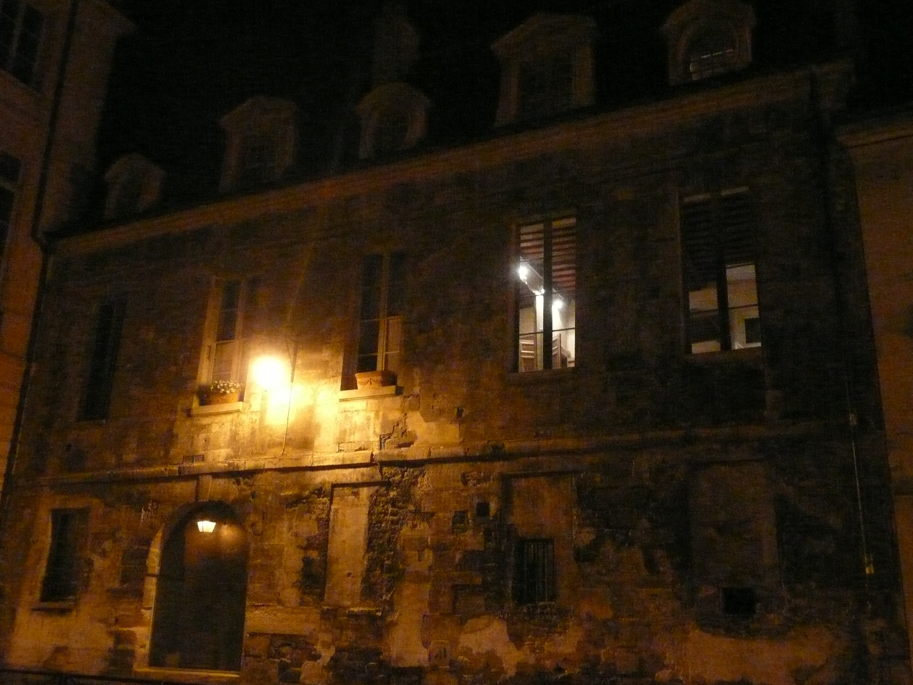 Façade du numéro 1 bis de la Rue de Béarn, dans Le Marais, à Paris (France)